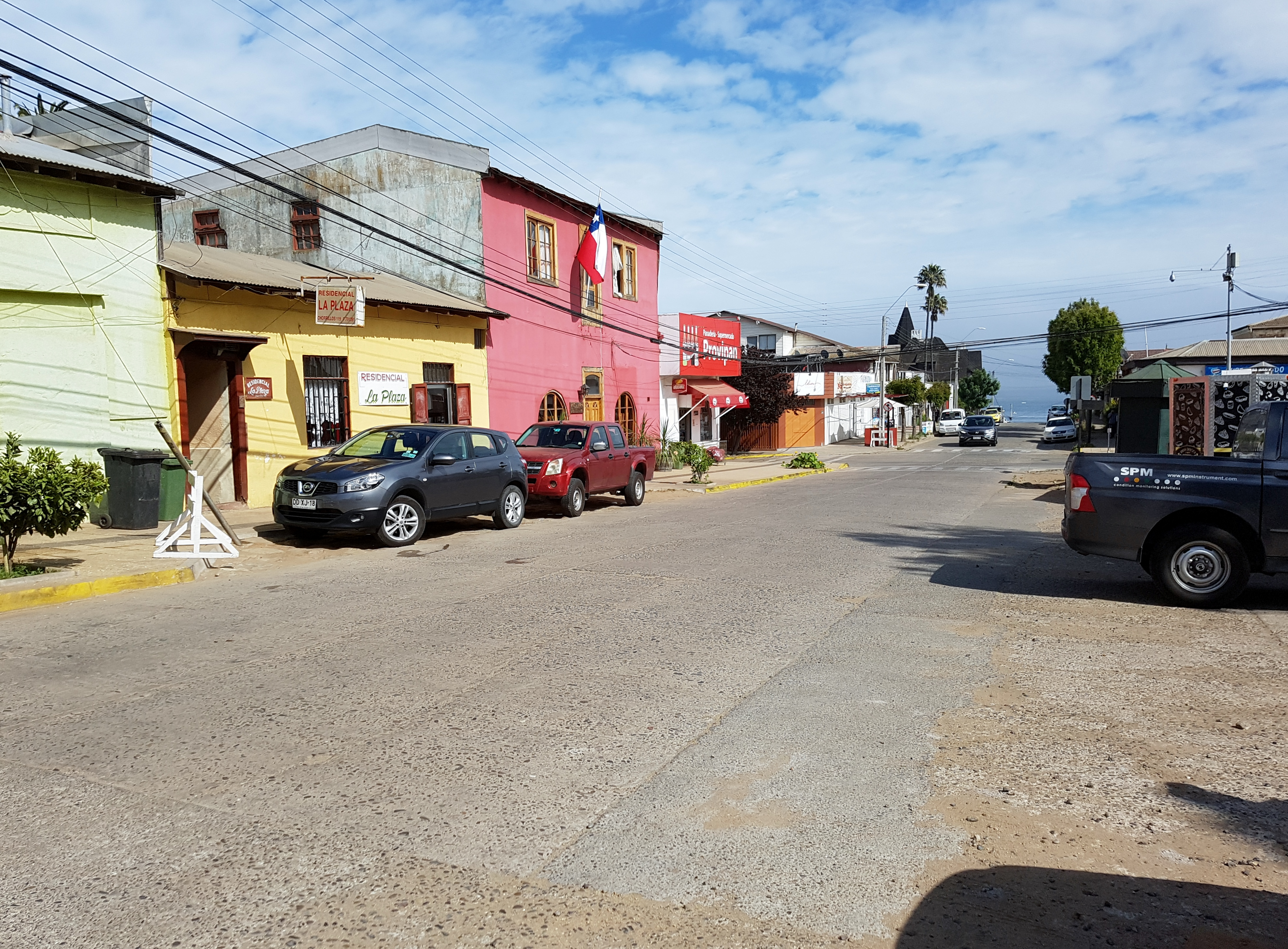 Calle Chorrillos a la altura de la plaza, Papudo, Chile.